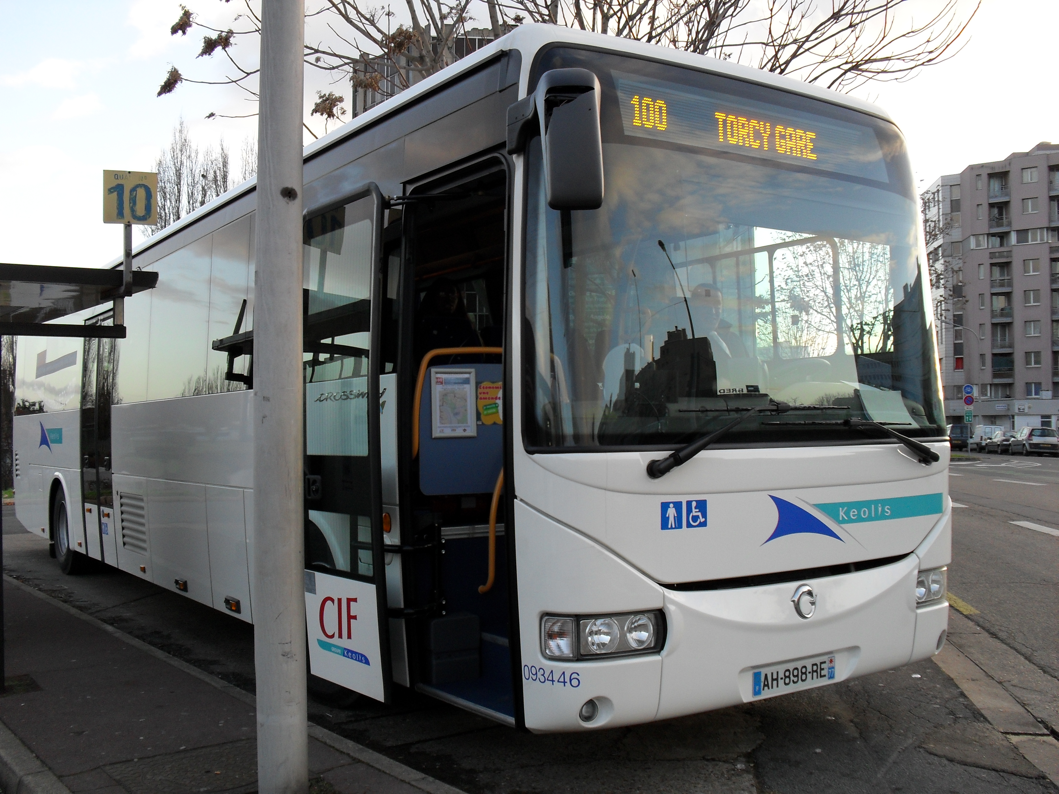 Irisbus Crossway CIF/VAS sur le 100